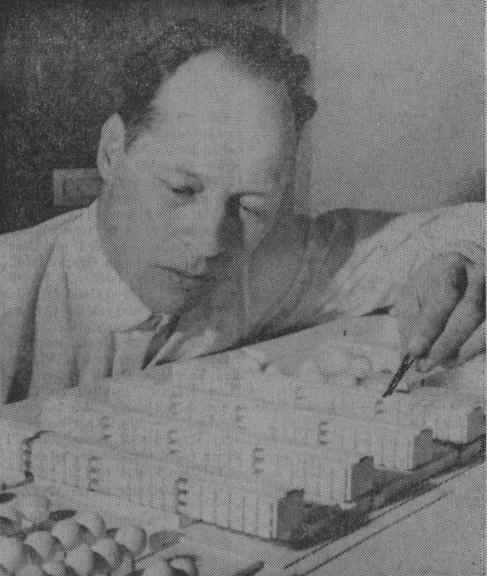 Arkitekten Bengt Edman med modell av studentbebyggelse vid Tunavägen i Lund